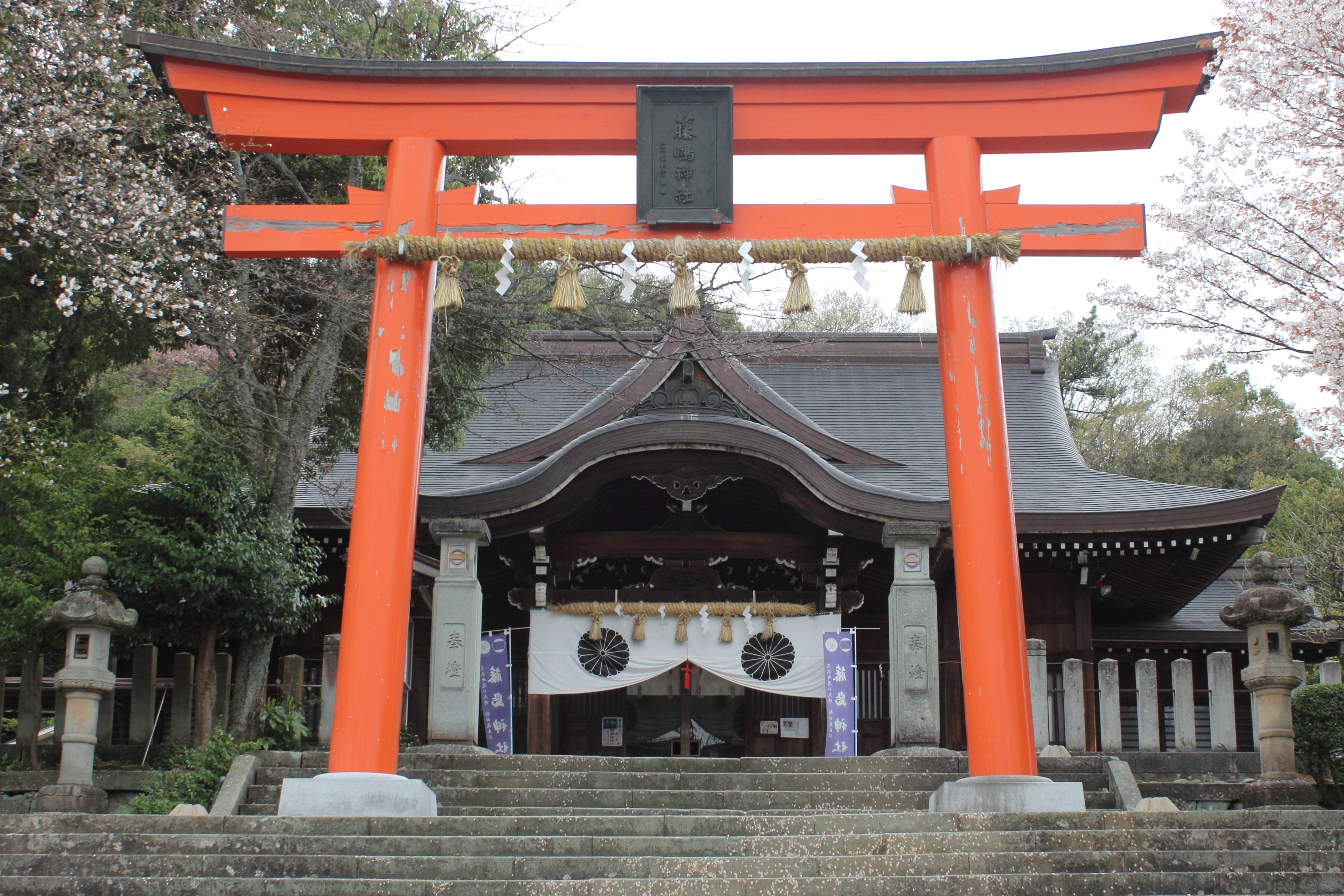 足羽山にある藤島神社